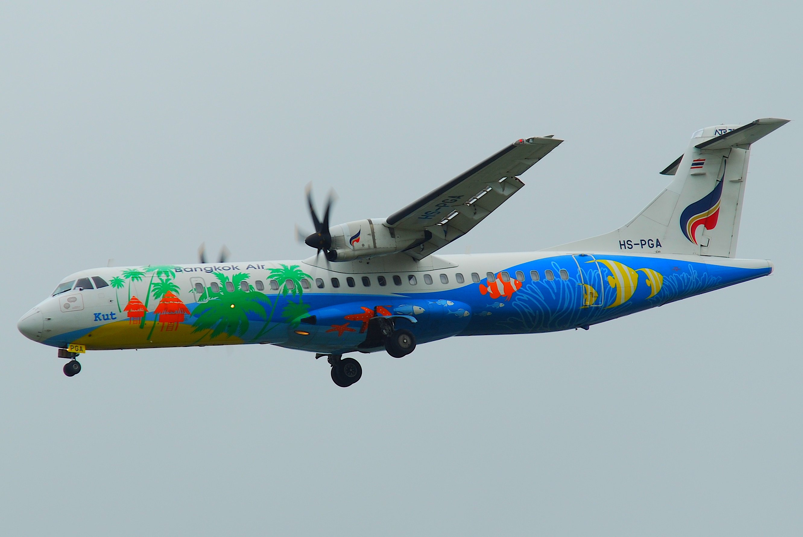 Bangkok Airways ATR 72-212A; HS-PGA@BKK;30.07.2011/613eq